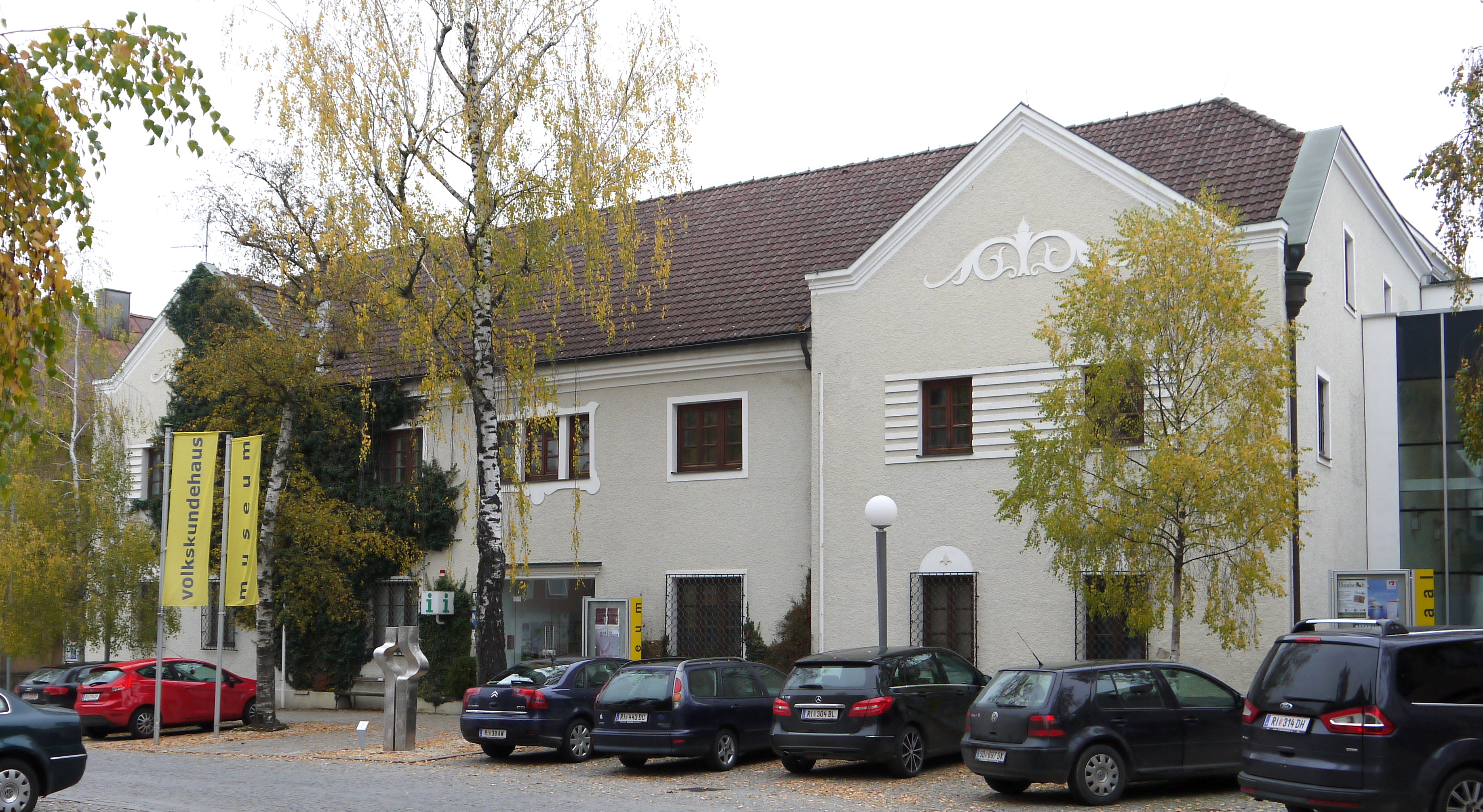 Volkskundehaus